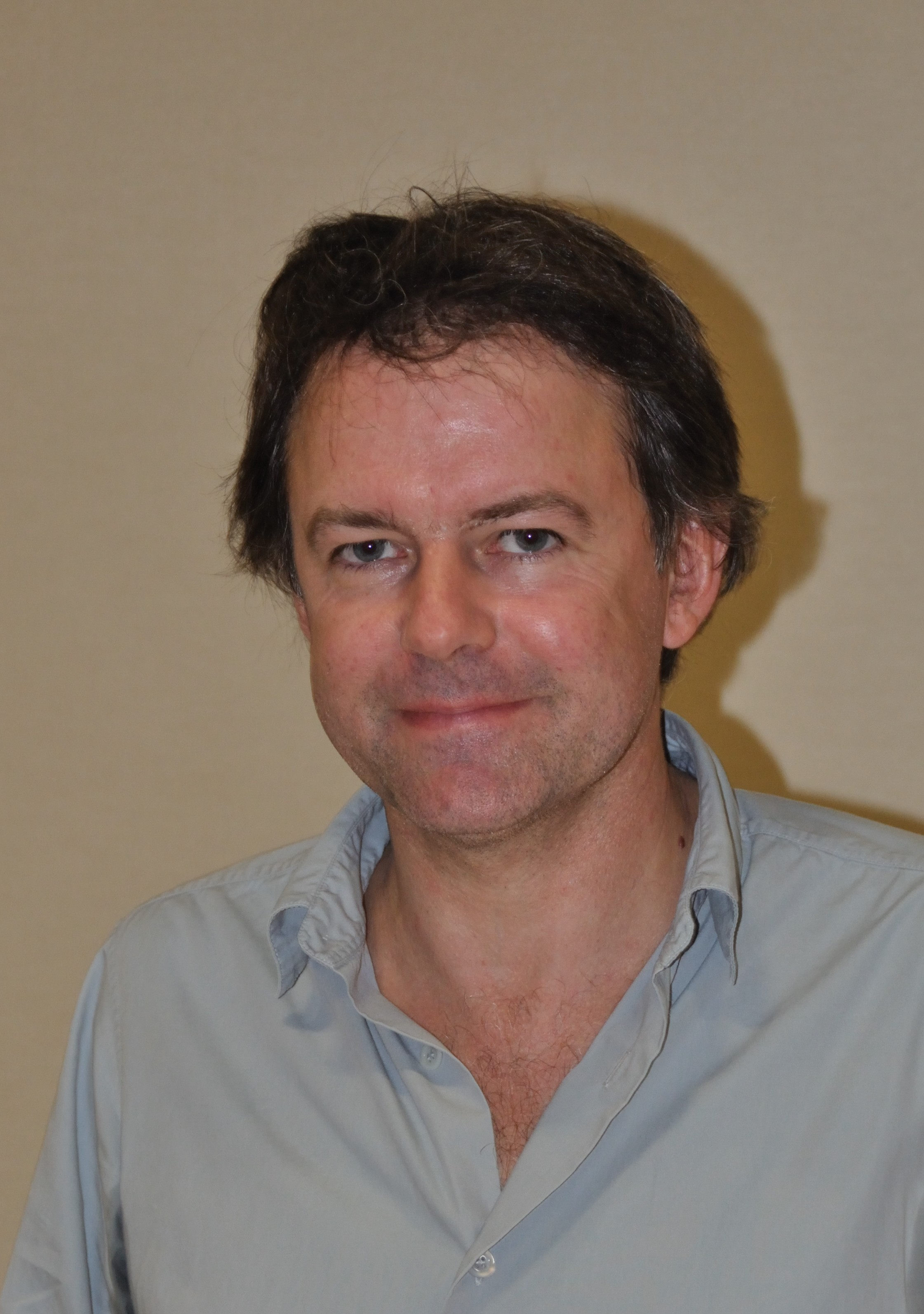 L'écrivain Yannick Haenel en octobre 2011.